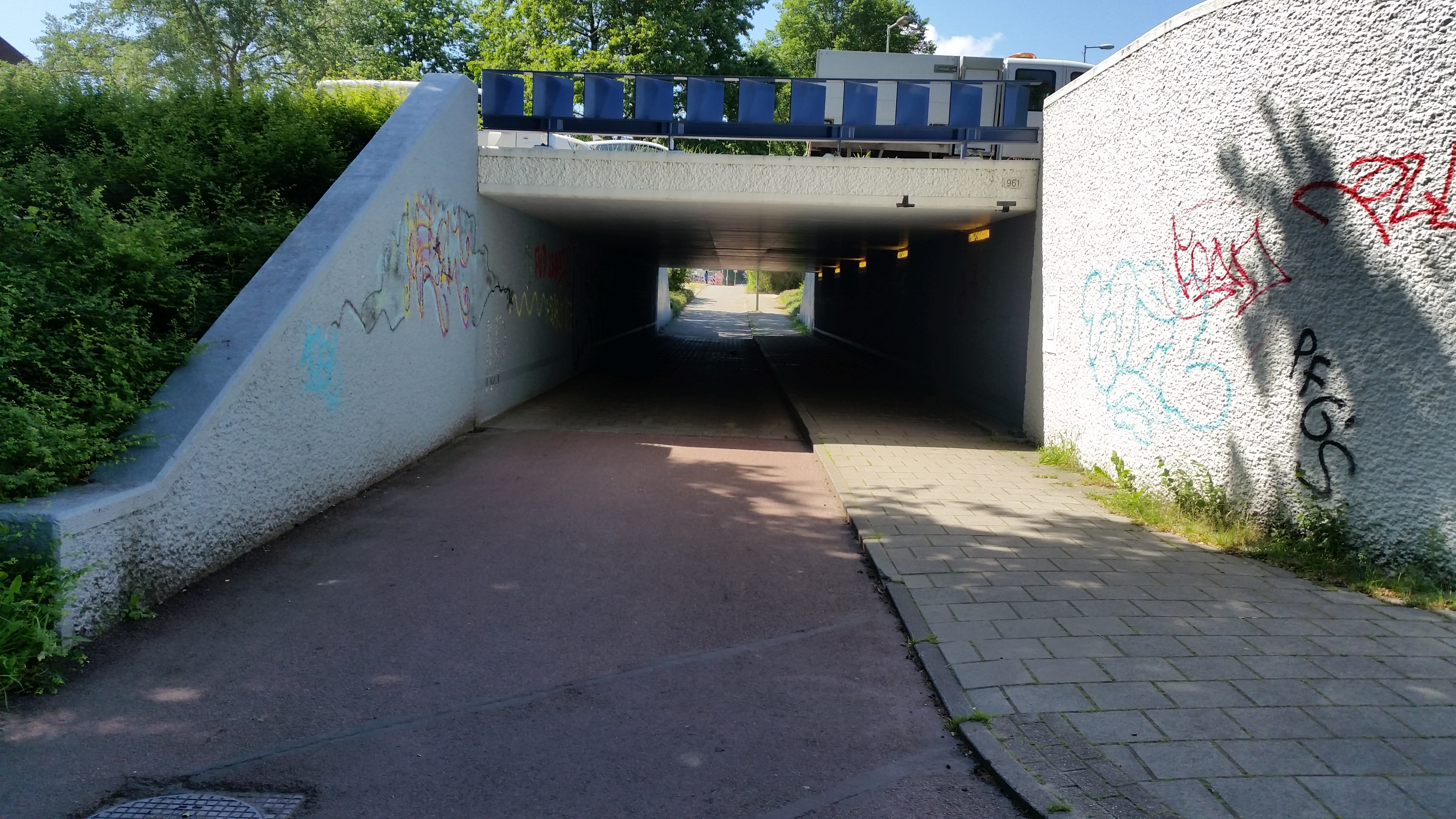 Impressie van brug 961 in de Nieuwe Purmerweg over het fietspad Waddenweg, Amsterdam-Noord (mei 2020)